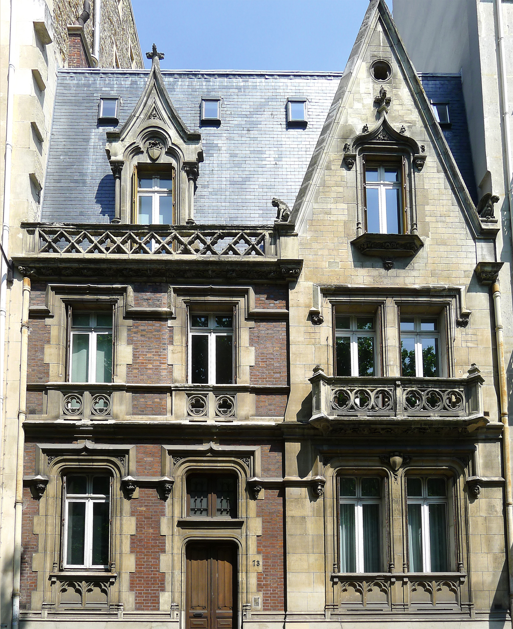 Boulevard Raspail (n° 73) - Paris VI